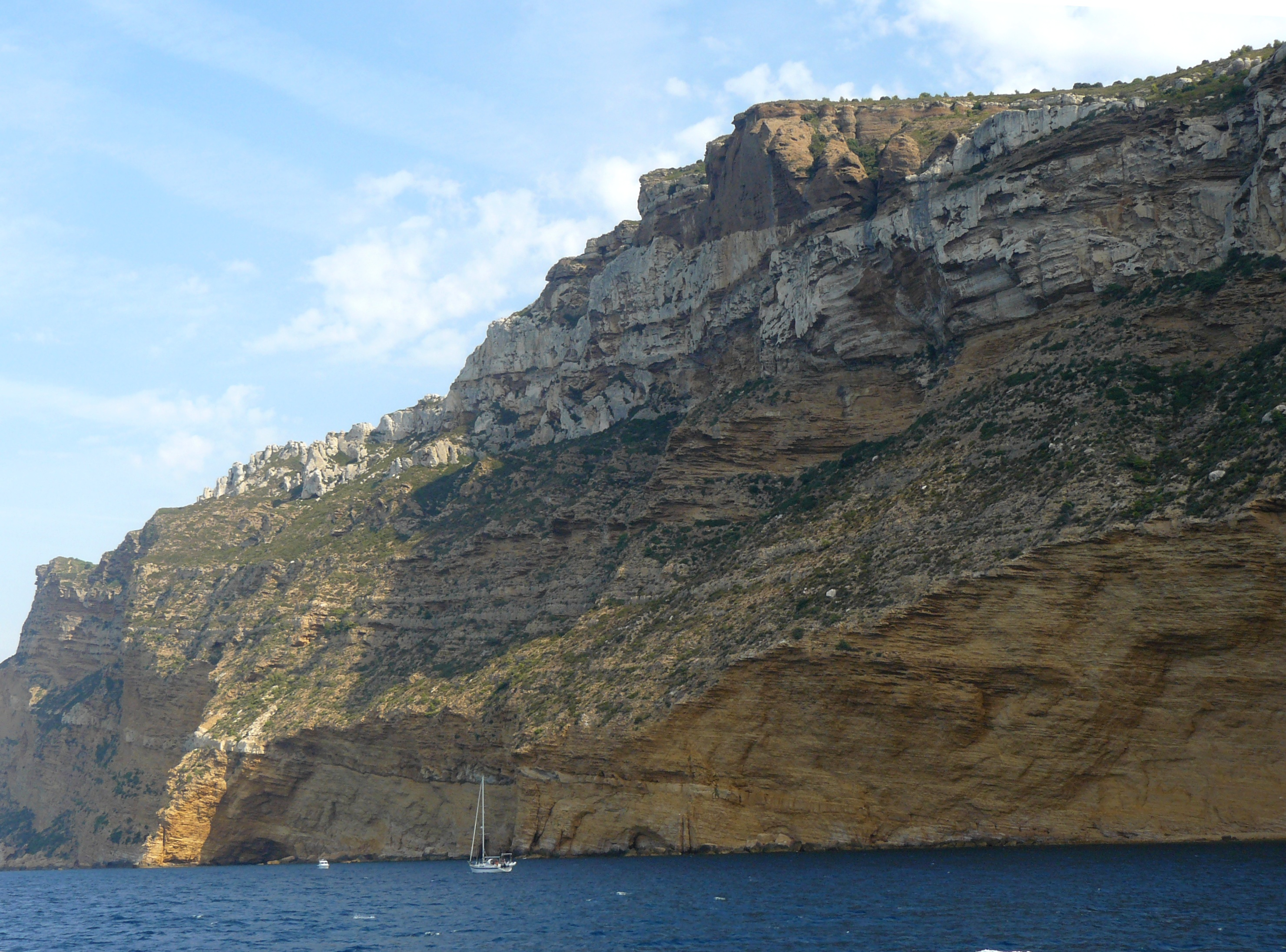 Falaises de Soubeyrannes, entre Cassis et La Ciotat, vue prise de la mer, en haut le sémaphore du Bec de l'Aigle